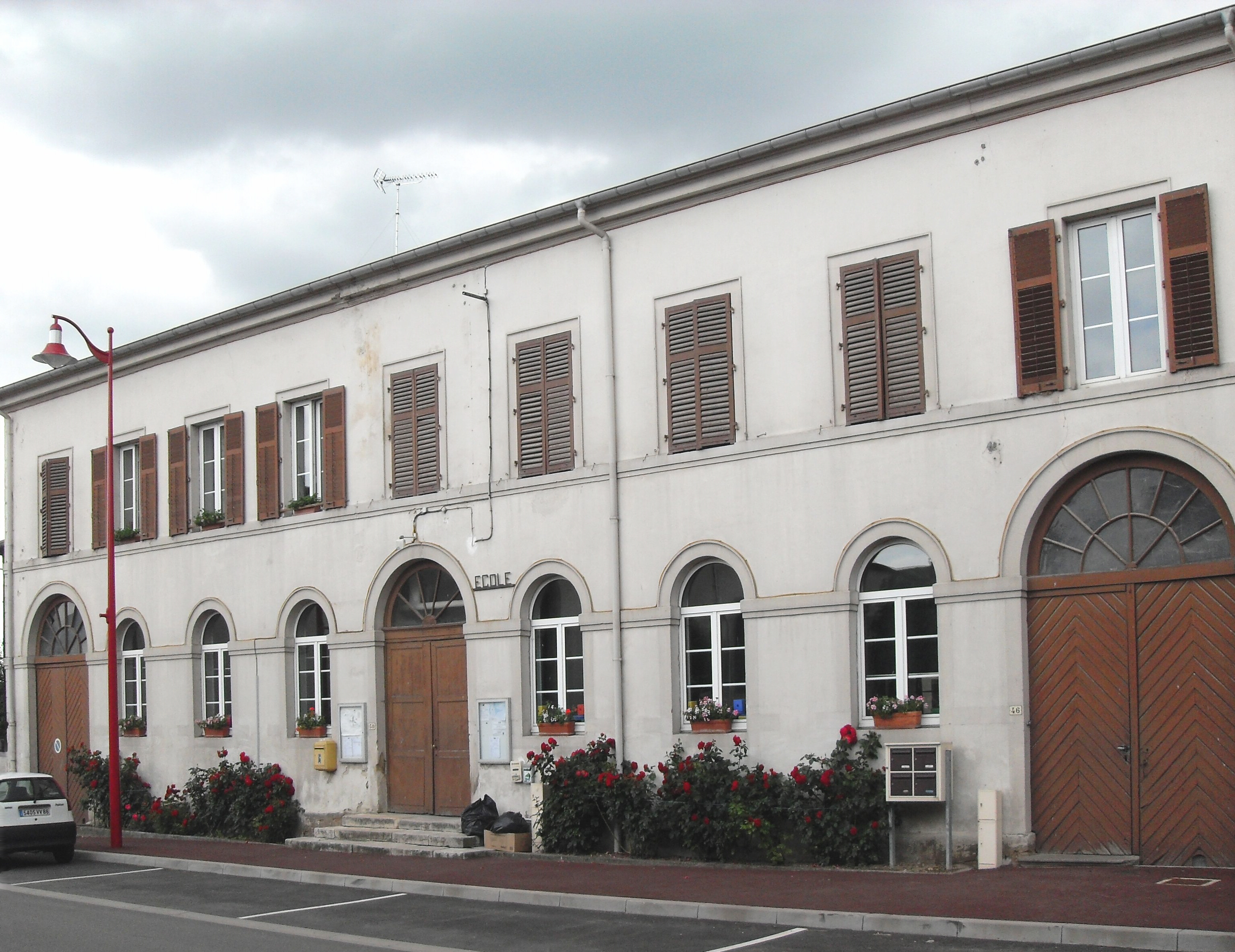 L'école de Chamagne